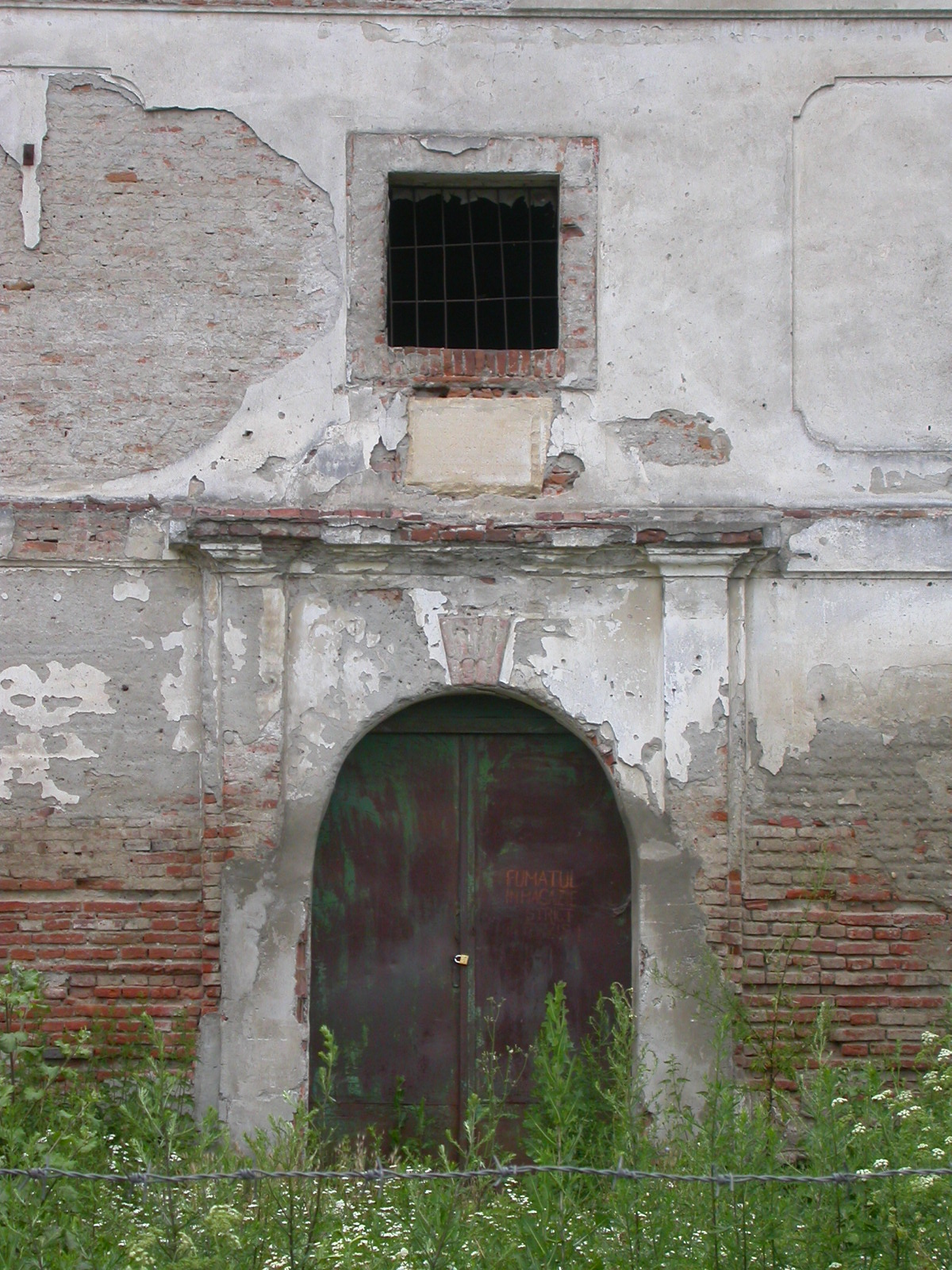 Grânar, sec. XVIII 02